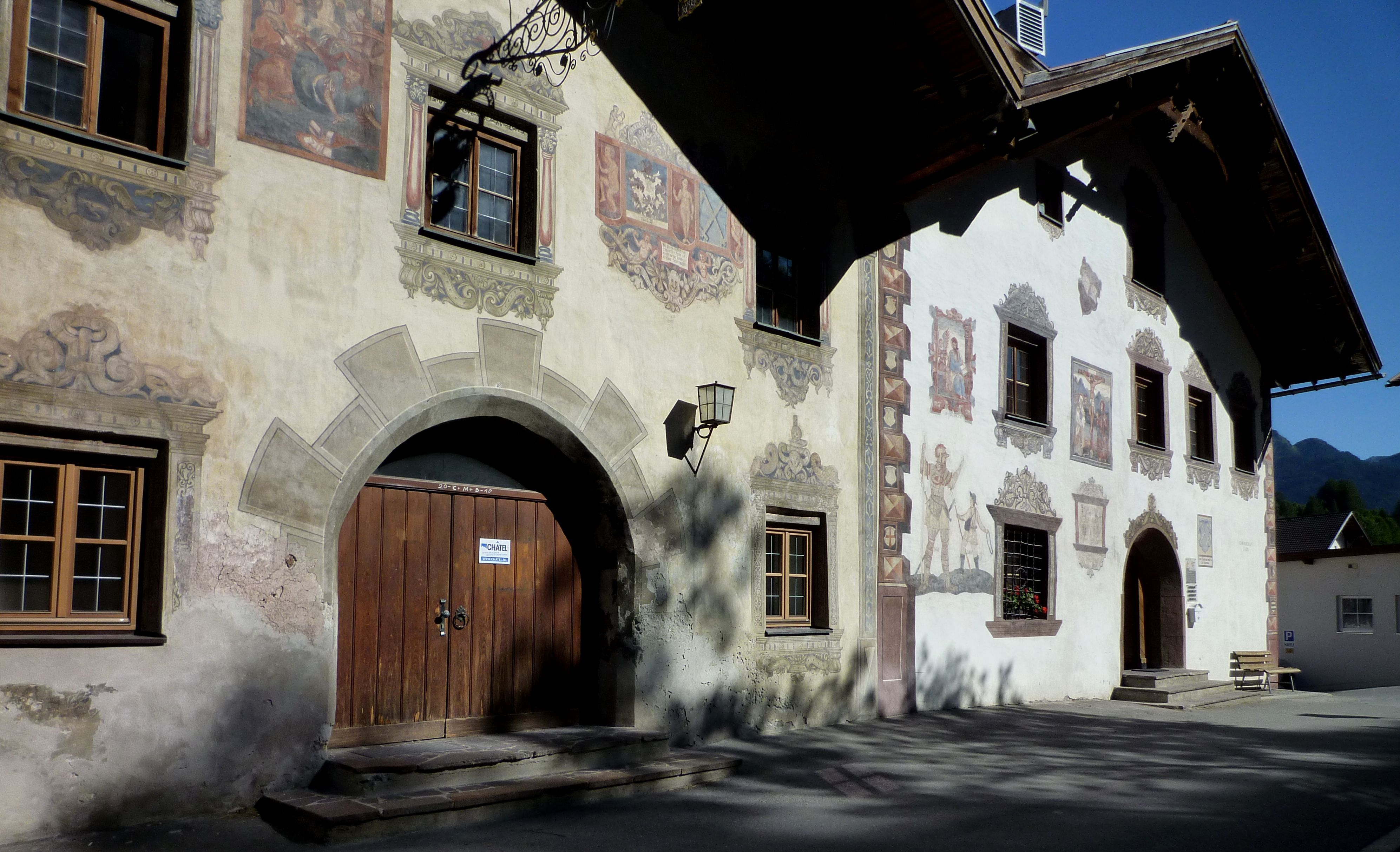 Ladis - Historische Häuser, re Gemeindeamt, Gasthaus Rose 1590 li